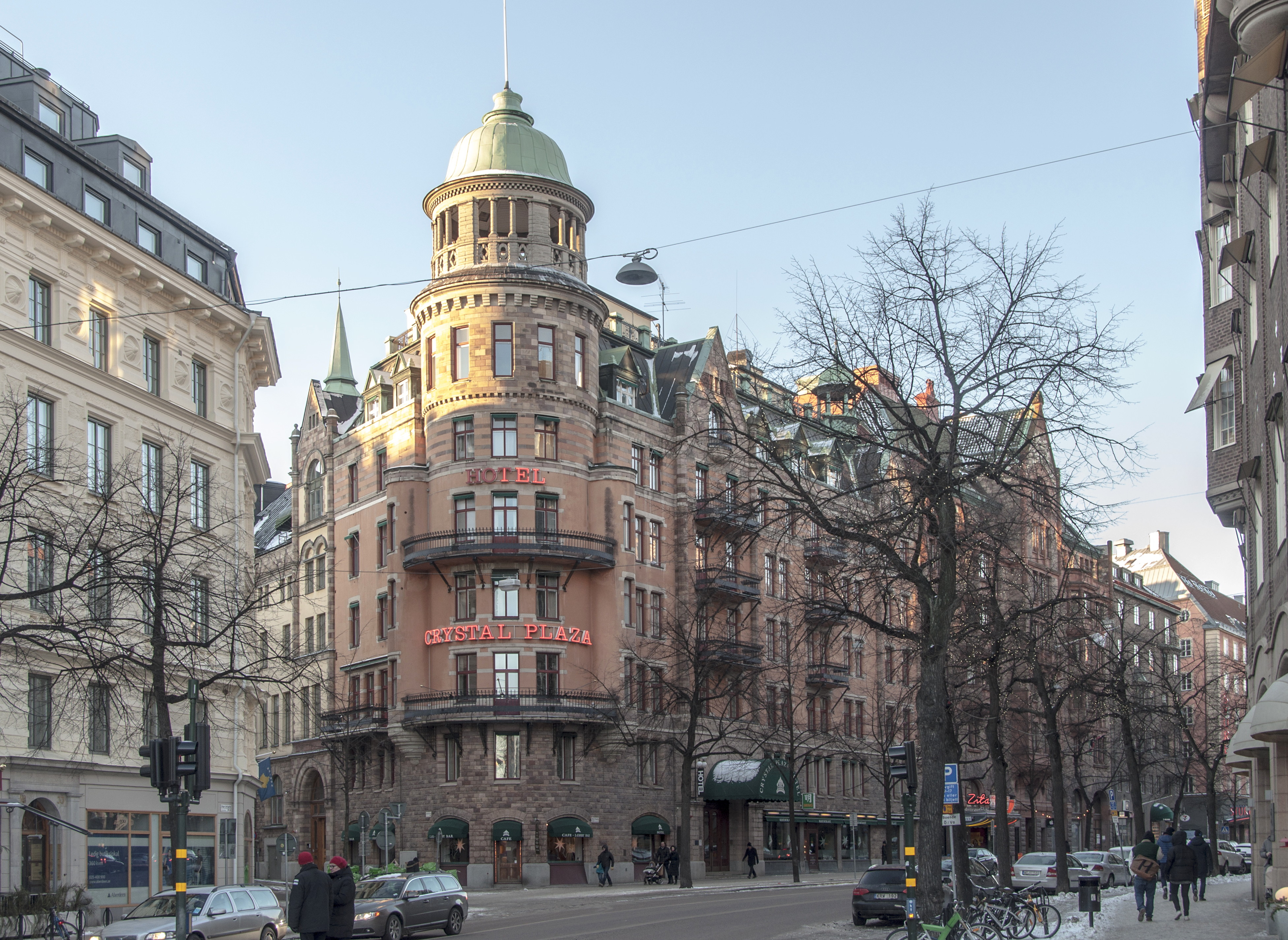 Hotel Cristal Plaza, Birger Jarlsgatan 35, Stockholm. Nybyggnadsår 1907 - 1910 Carl Alfred Danielsson-Bååk (Arkitekt) KFUM Kristliga Föreningen för Unga Män (Byggherre) Richard Bengtsson (Byggmästare)